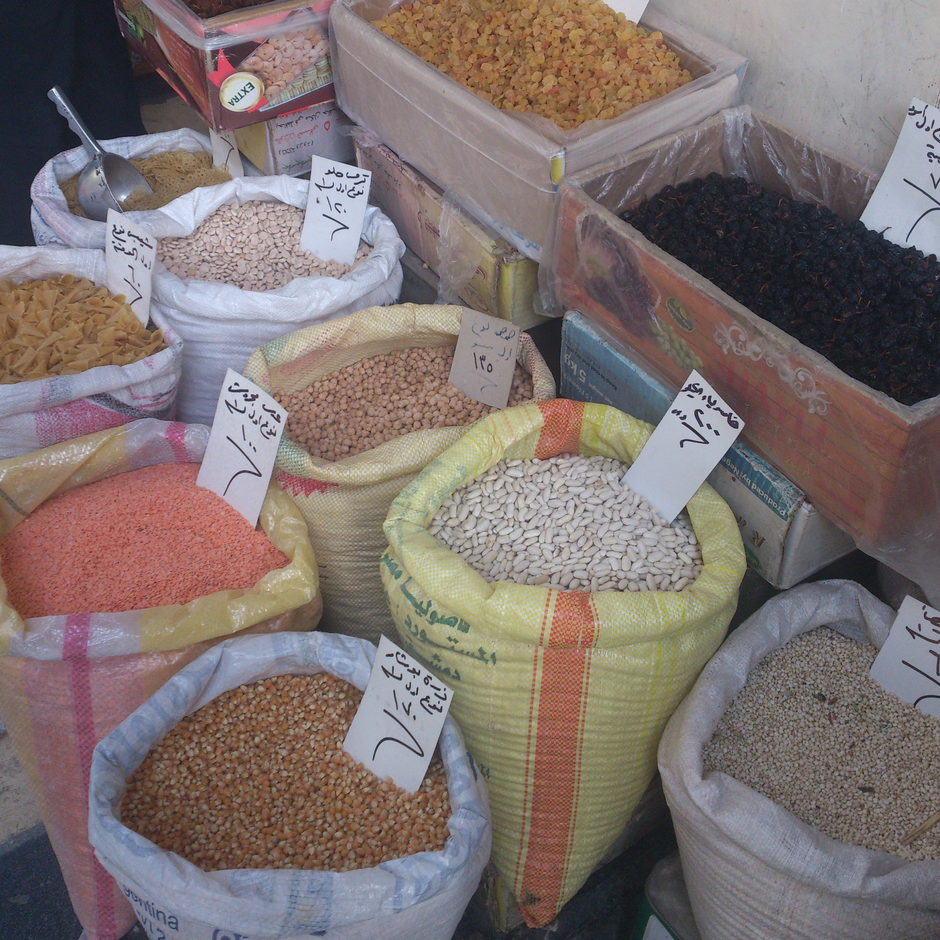 منتجات سورية